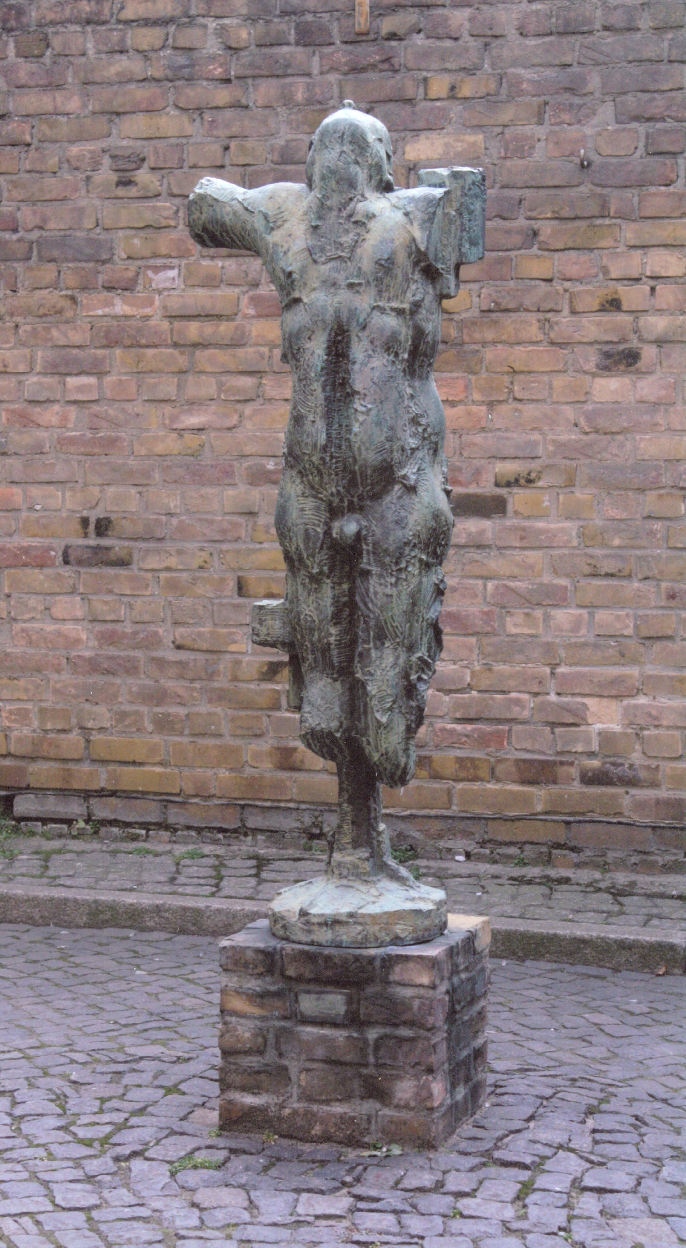 Skulptur „Das Opfer“ von Wieland Förster im Hof der heutigen Gedenkstätte Lindenstraße 54/55 in Potsdam. Sie ist den Opfern der Gewalt gewidmet.